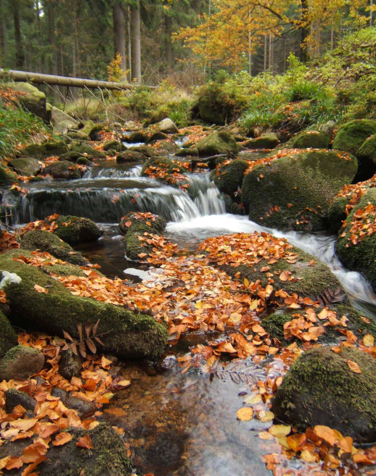 Große Bode oberhalb Braunlage (fließt zusammen mit kleiner Bode als Warme Bode weiter, Warme Bode vereinigt sich mit Kalter Bode zur Bode)